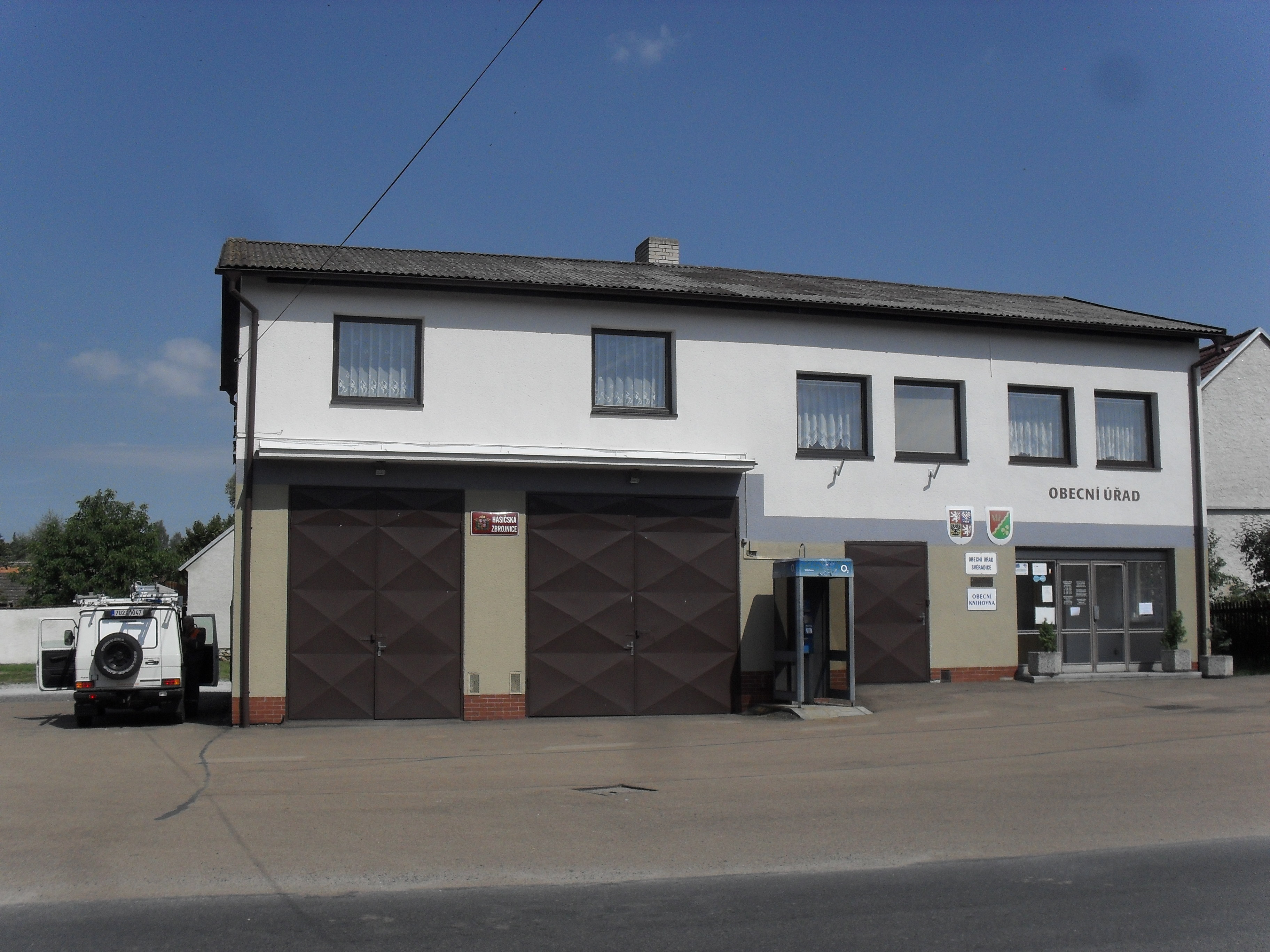 Fotografie pořízena v obci Svéradice.